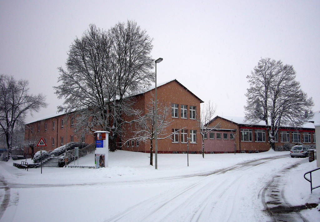 Hanfbachschule Möglingen seit24.Okt.1953